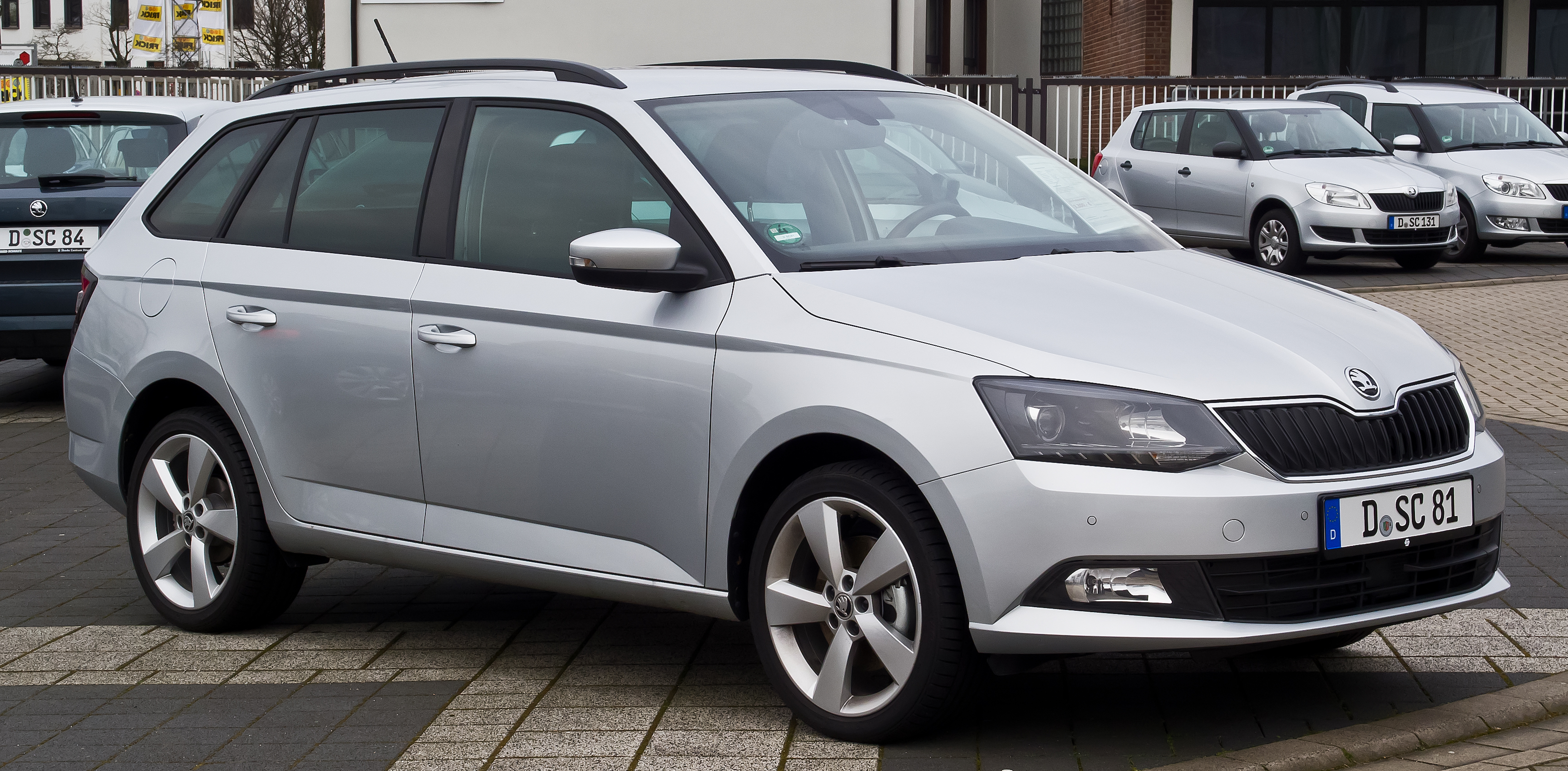 Skoda Fabia Combi 1.2 TSI Style (III)